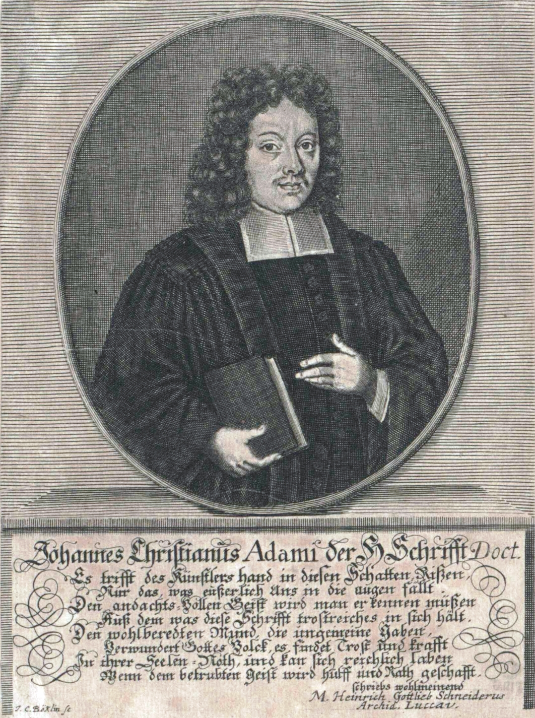 Johann Christian Adami (1662-1715), Kupferstich, Bild: 180x135 mm Johannes Christianus Adami der H. Schrifft Doct. Es trifft des Künstlers hand in diesen Schatten-Rißen, Nur das, was eußerlich Uns in die augen fällt. Den andachts-Vollen Geist wird man erkennen müßen Auß dem was diese Schrifft trostreiches in sich hält. Den wohlberedten Mund, die ungemeine Gaben, Verwundert Gottes Volck, es findet Trost und krafft In ihrer Seelen-Noth, und kann sich reichlich laben Wenn dem betrubten Geist wird hülff und Rath geschafft. schriebs wohlmeinend M. Heinrich Gottlieb Schneiderus Archid. Luccau